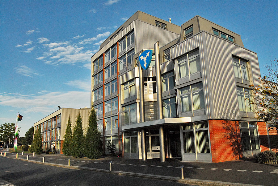 Zeven Aspe Lisega